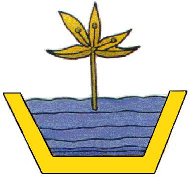 Escudo del municipio de Axochiapan, Morelos.